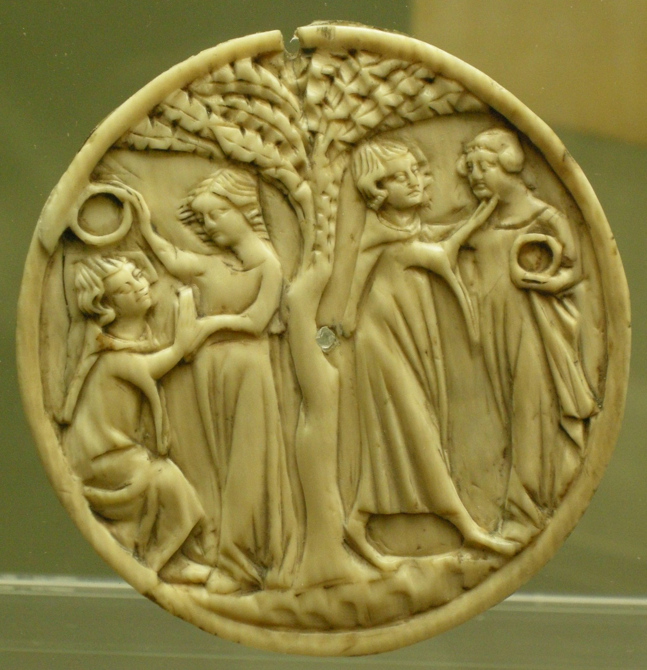 Francia, coperchio di specchio con scene galanti, xiv sec., inv. 692